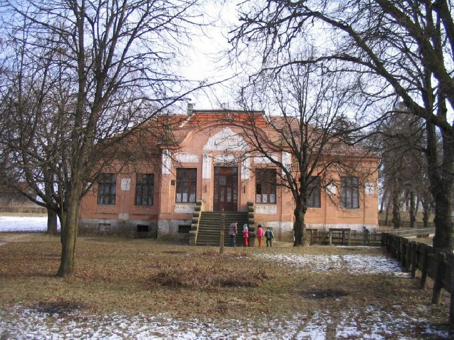 Lécfalvi művelődési ház, 2006